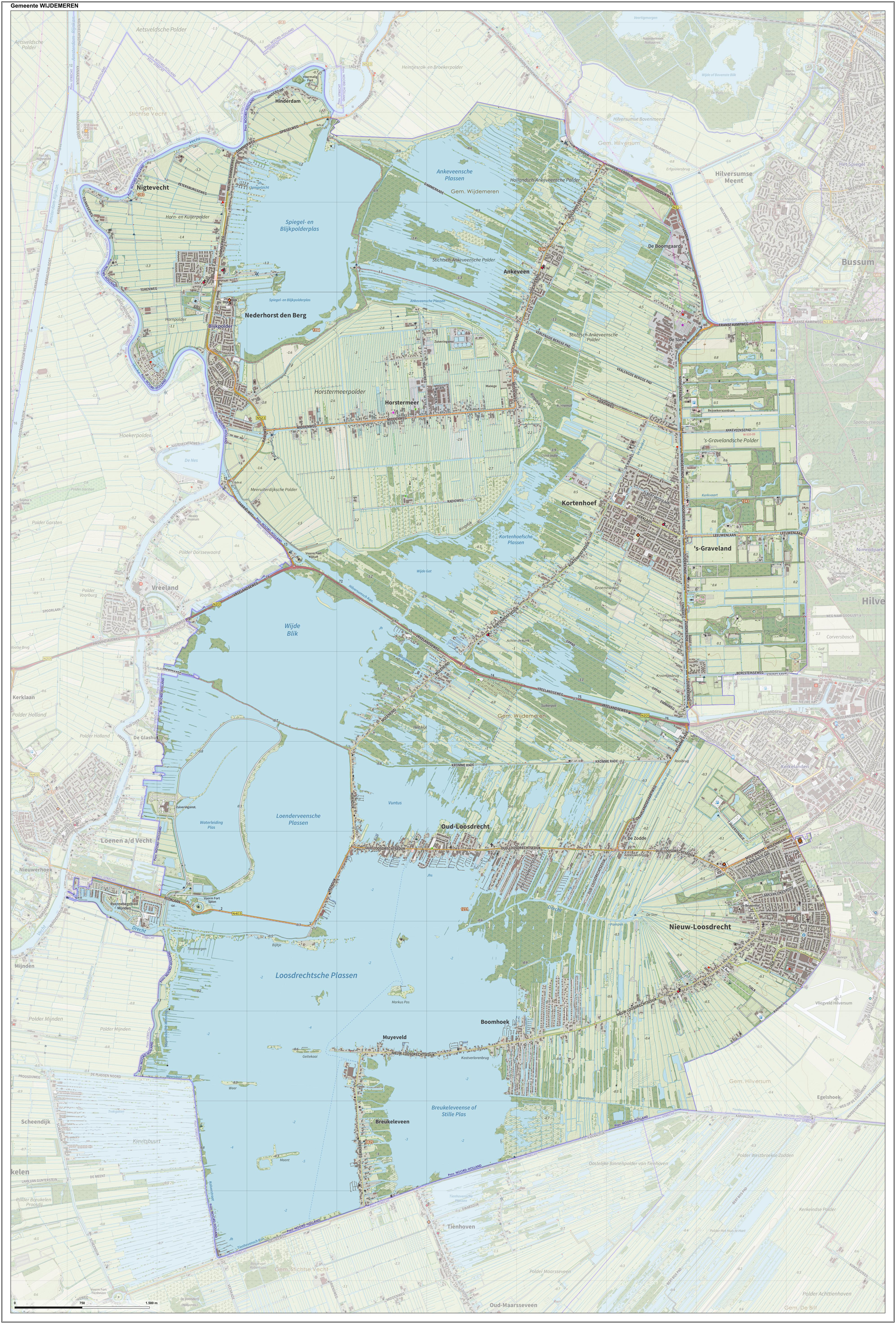 Topografische gemeentekaart. Resolutie: 400 pixels/km. Kaartbeeld samengesteld uit de open geodata van de Top10NL en Top25namen (Kadaster), Creative Commons-BY licentie. Gebouwvlakken uit open geodata BAG extract. Wegen uit de OpenStreetMap, OpenStreetMap community. Reliëfschaduw uit de Actuele Hoogtekaart AHN2. Samenstelling en kleurenschema: Jan-Willem van Aalst, met QGIS. Zie ook de Legenda.